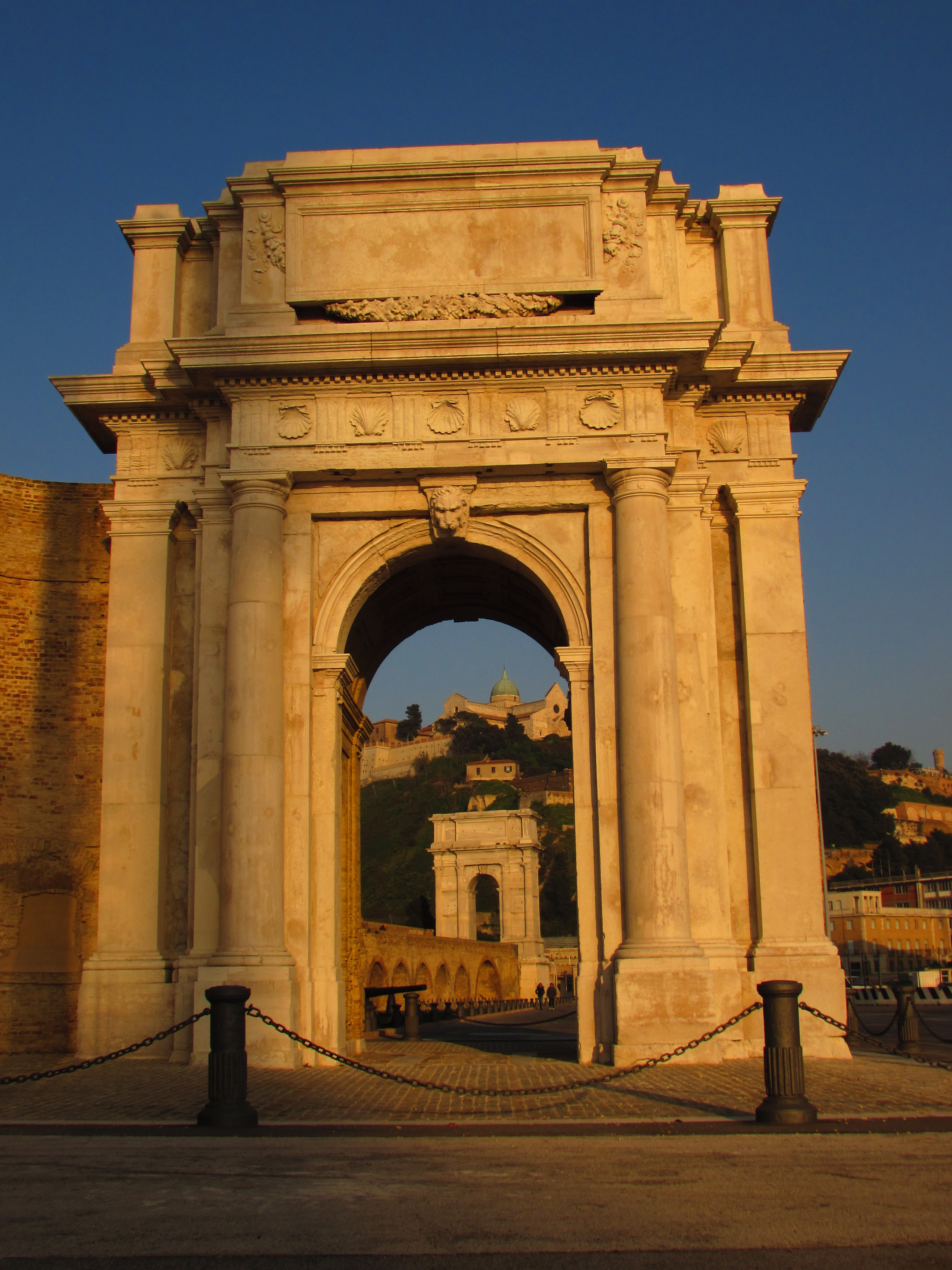 Arco di Traiano in lontananza This is a photo of a monument which is part of cultural heritage of Italy.